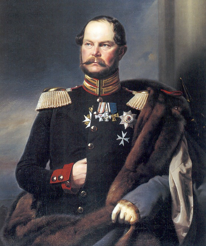 Carl von Preußen (1801-1883)